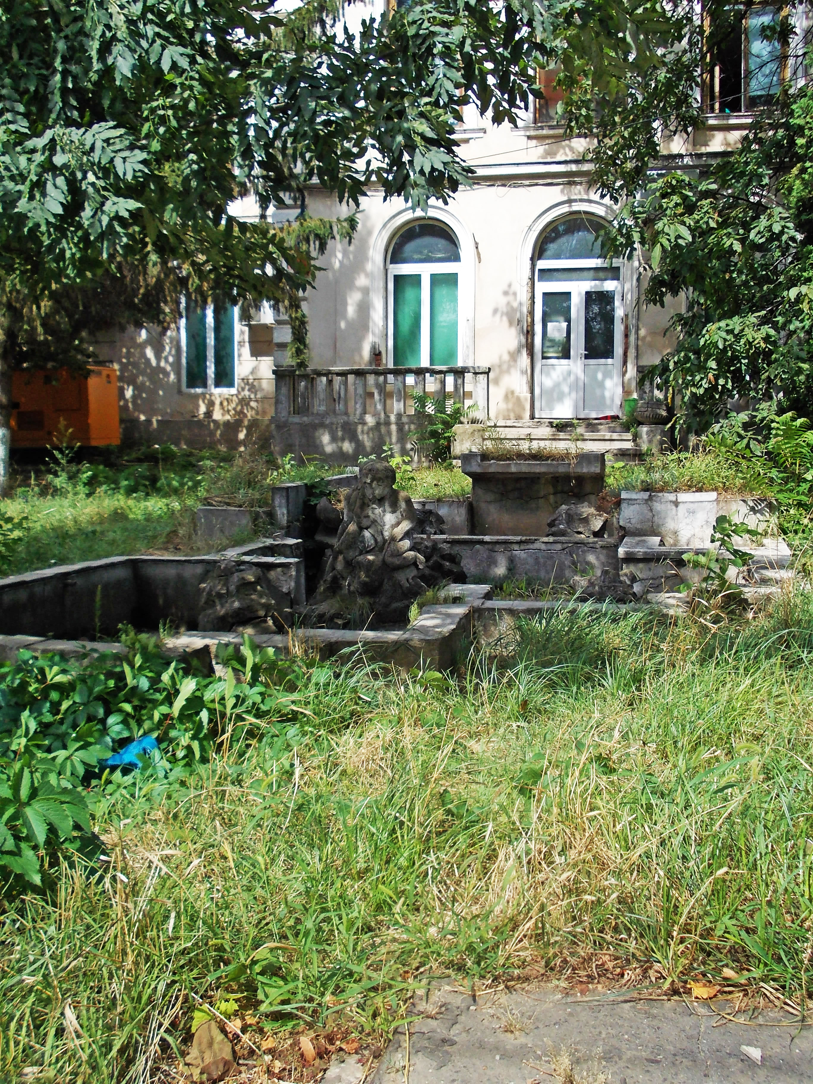 Spitalul de Urgențe (corp vechi)